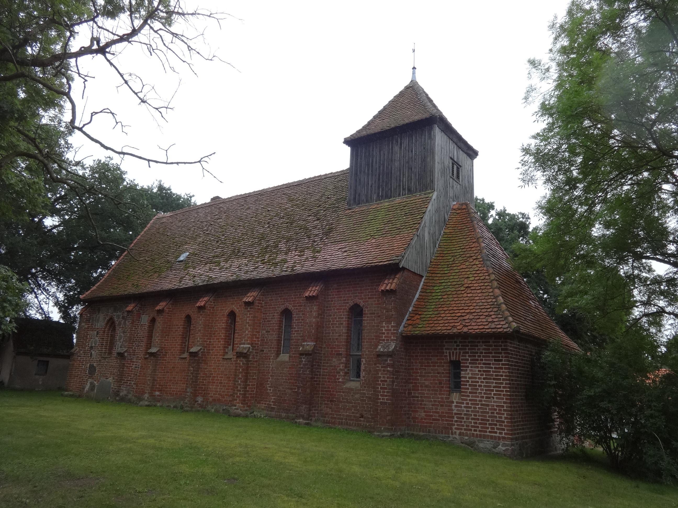 Die Dorfkirche Schönfeld ist eine Backsteinkirche aus der Zeit um 1400. In seinem Innern befindet sich unter anderem eine Kanzel aus dem 17. Jahrhundert.